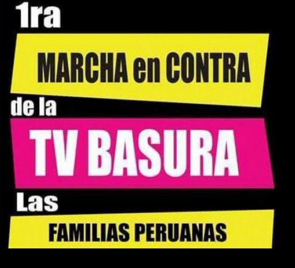 Logo del afiche promocional de la campaña llamada "Marcha contra la televisión basura" ofrecida por el Colegio de Periodistas de Lima.